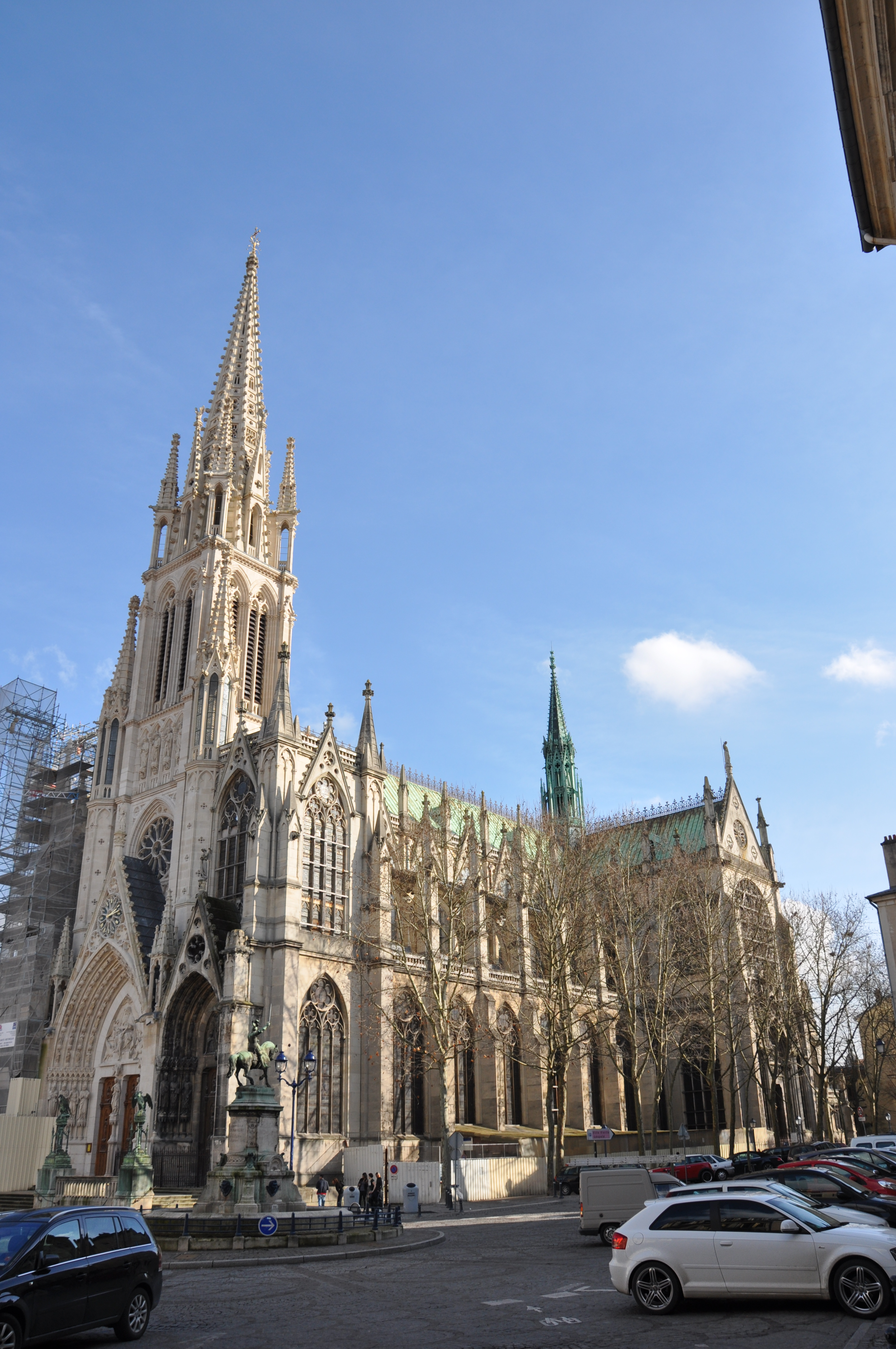 Basilique Saint-Epvre de Nancy, Nancy, Lorraine, France